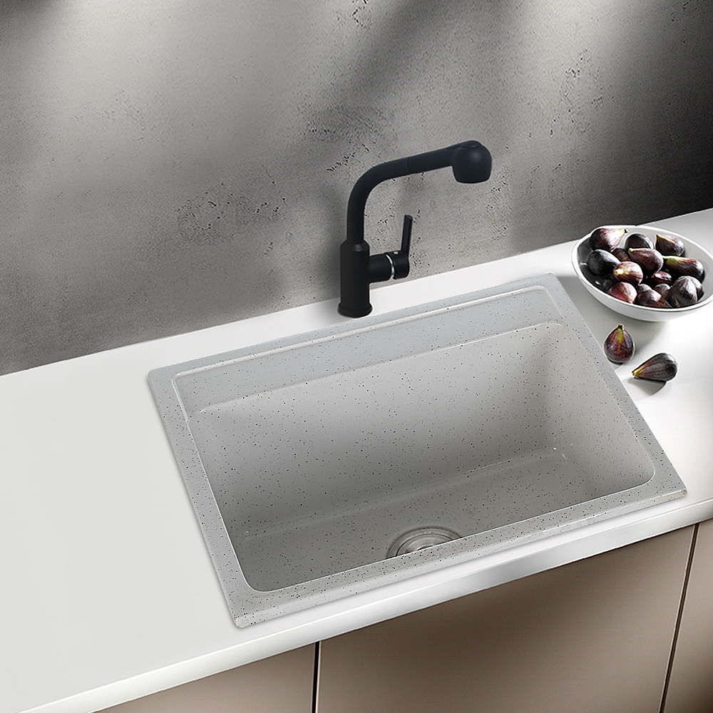 Chậu rửa bát, bồn rửa chén, bồn rửa, chậu rửa bằng đá